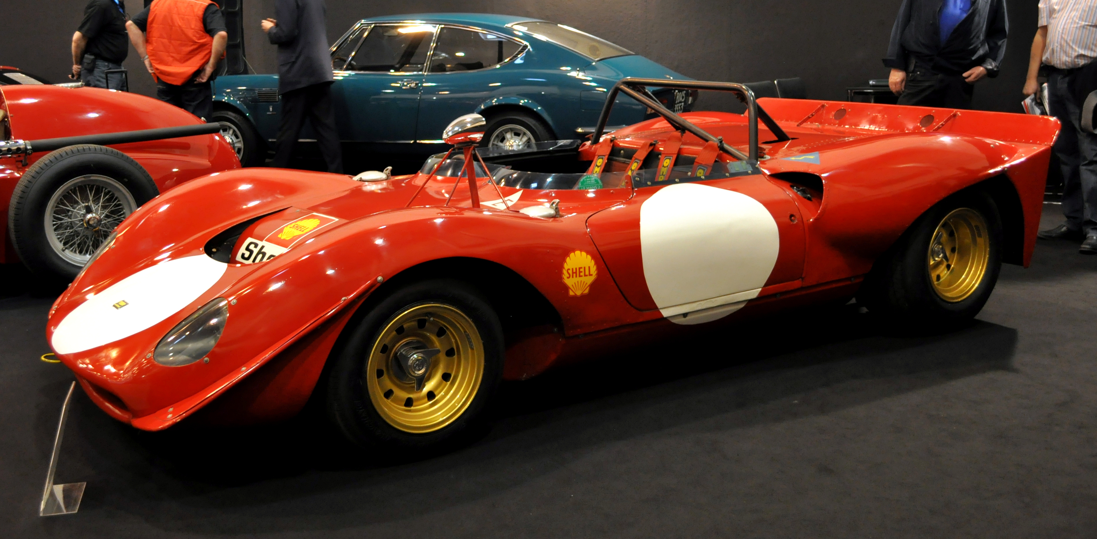 Ferrari Dino 206S (Chassis No. 018, 1966) auf der Technoclassica 2011 in Essen